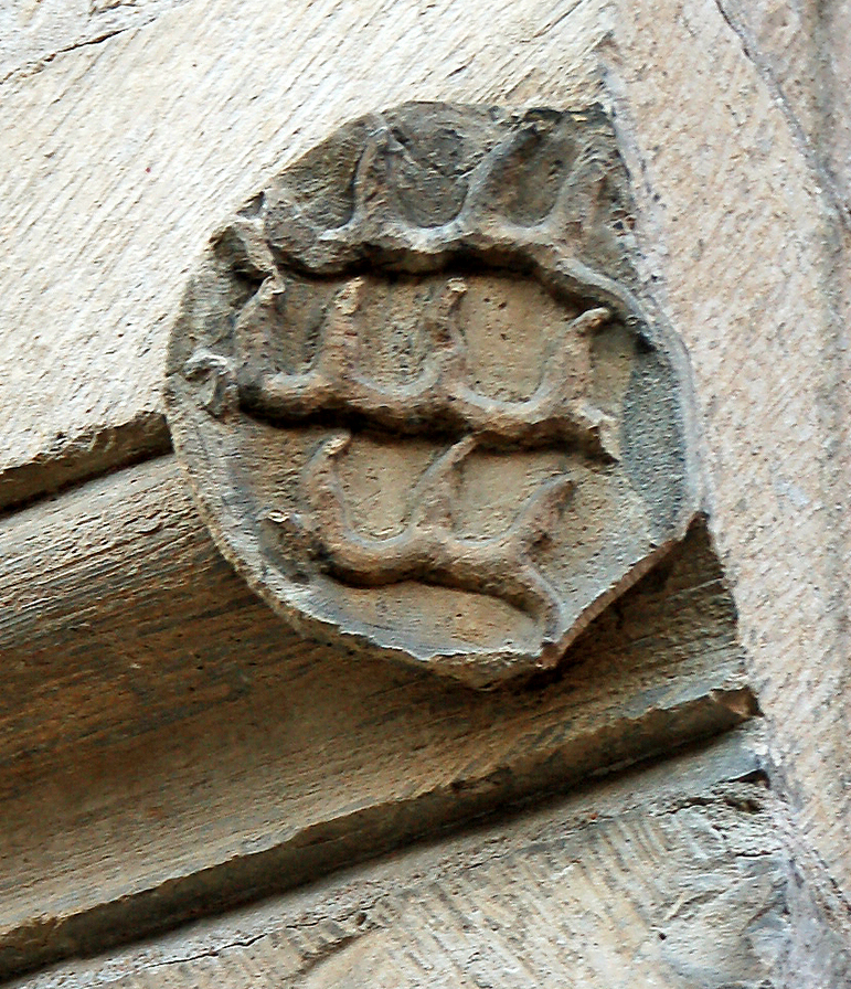 Wappen an der Südostecke von Pfarrhaus 1 in Markgröningen, laut Überlieferung das „Schloss der alten Grafen“ bzw. der Grafen von Grüningen, einer Seitenlinie der Grafen von Württemberg.